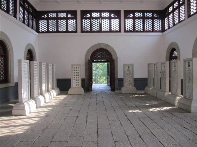 南岳忠烈祠享堂